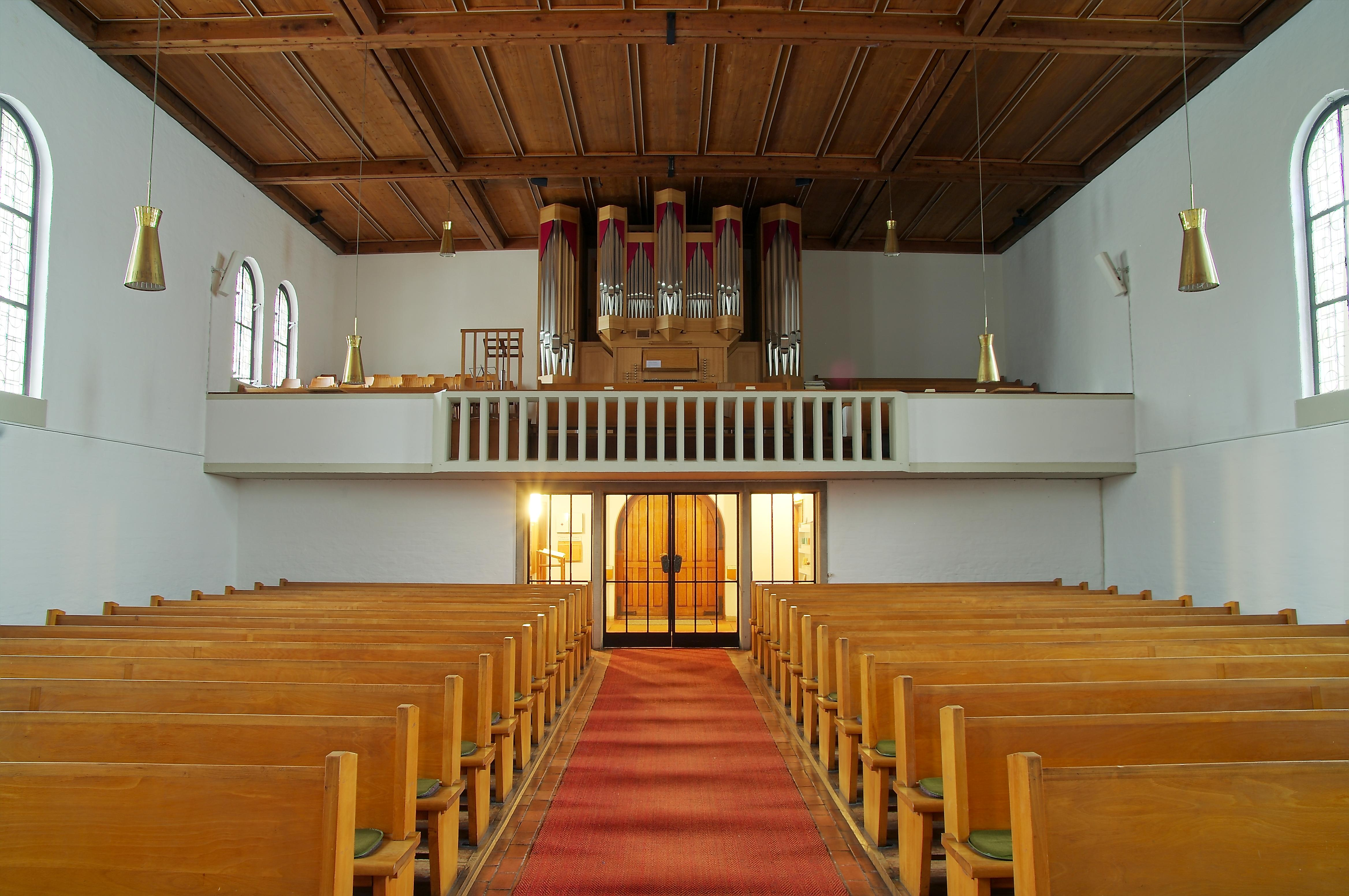 Lukaskirche (Freiburg)